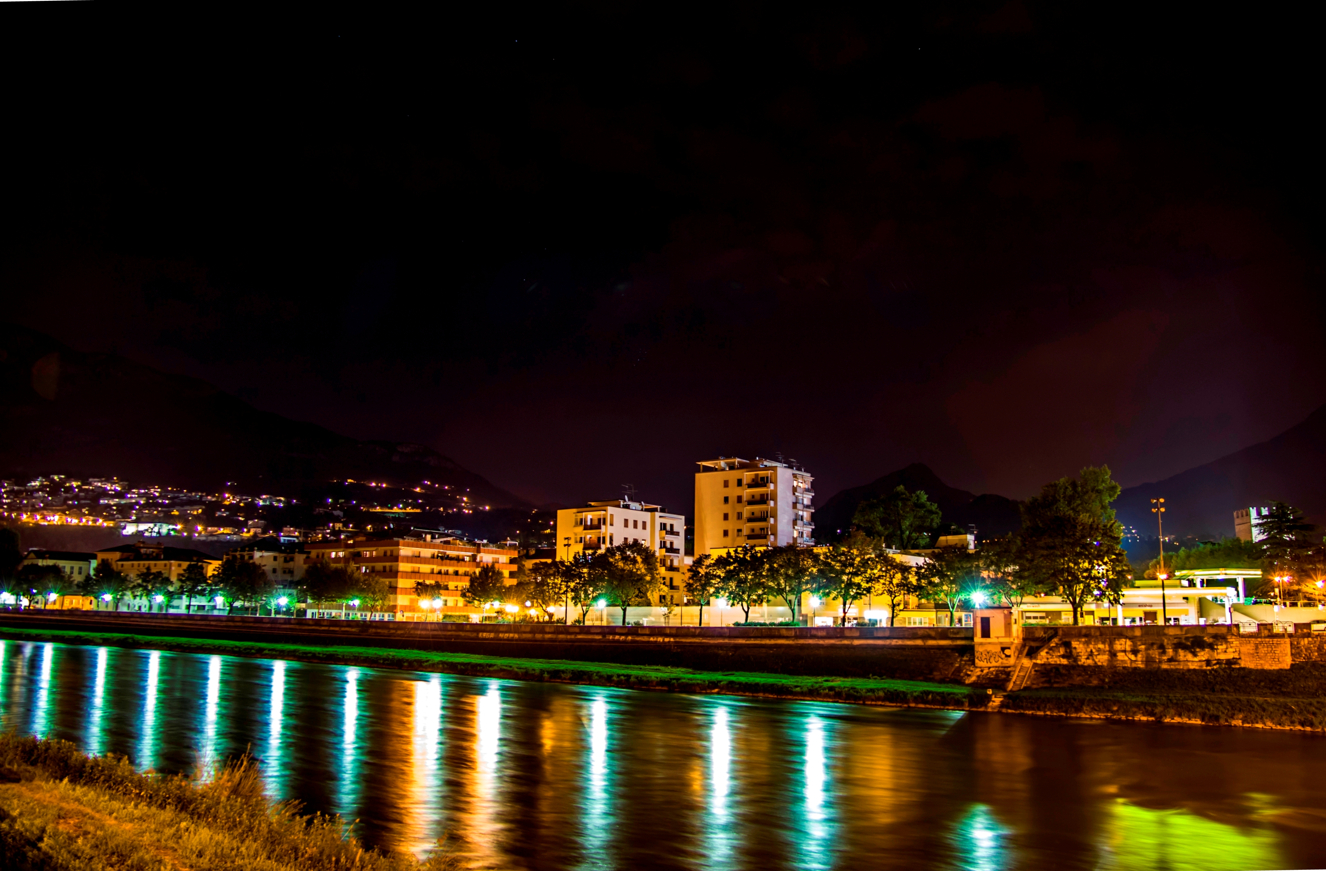 Trento night scene